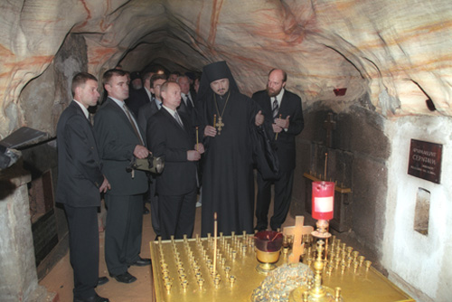 ПСКОВСКАЯ ОБЛАСТЬ. Посещение Псково-Печерского монастыря.